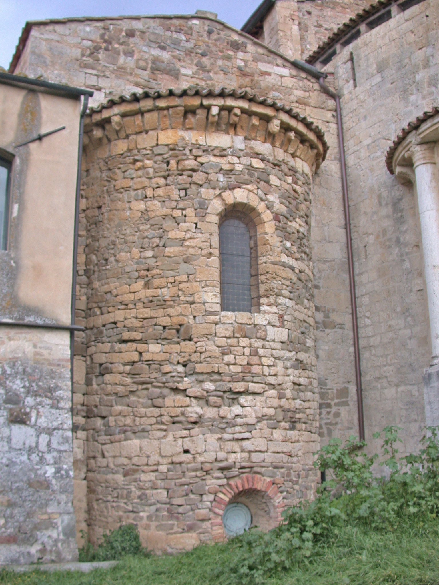 Italia, Toscana, provincia di Siena, Montalcino, Abbazia di Sant'Antimo, "Cappella carolingia", abside (esterno).